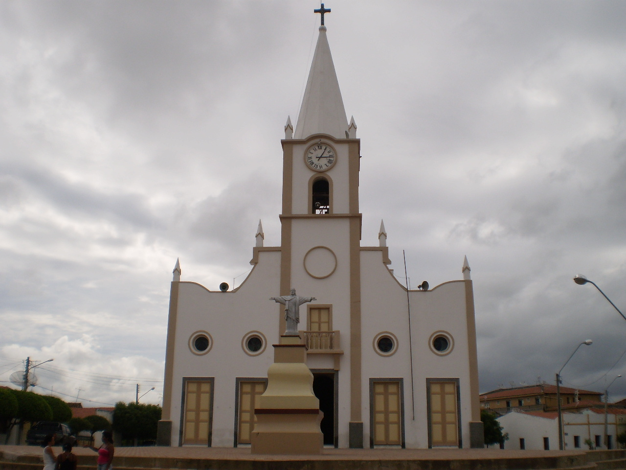 Imagem da Igreja Matriz de Jaguaribe em 11 de janeiro de 2010.